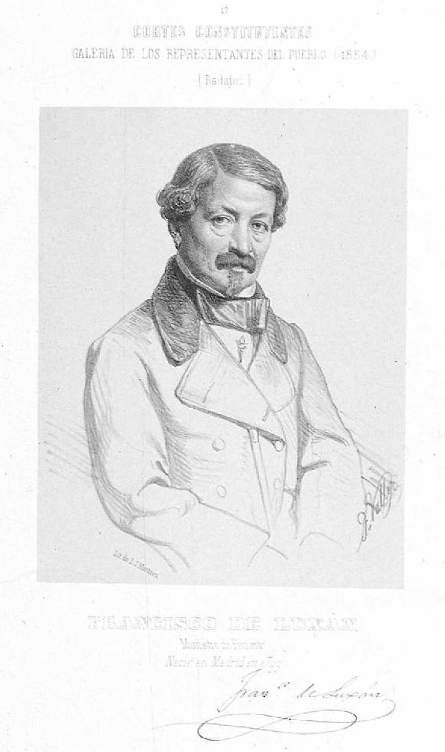 Francisco de Luján, litografía de José Vallejo y Galeazo: Cortes Constituyentes. Galería de representantes del pueblo. Inscripción: FRANCISCO DE LUXÁN / Ministro de Fomento / Nació en Madrid en 1799. Facsímil del autógrafo. Biblioteca Nacional de España